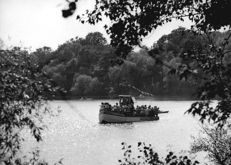 Leipzig, Auensee, Rundfahrt Zentralbild Koch 19.7.1965 Eine Rundfahrt auf dem Leipziger Auensee gehört mit zu den Annehmlichkeiten dieses Erholungszentrums.